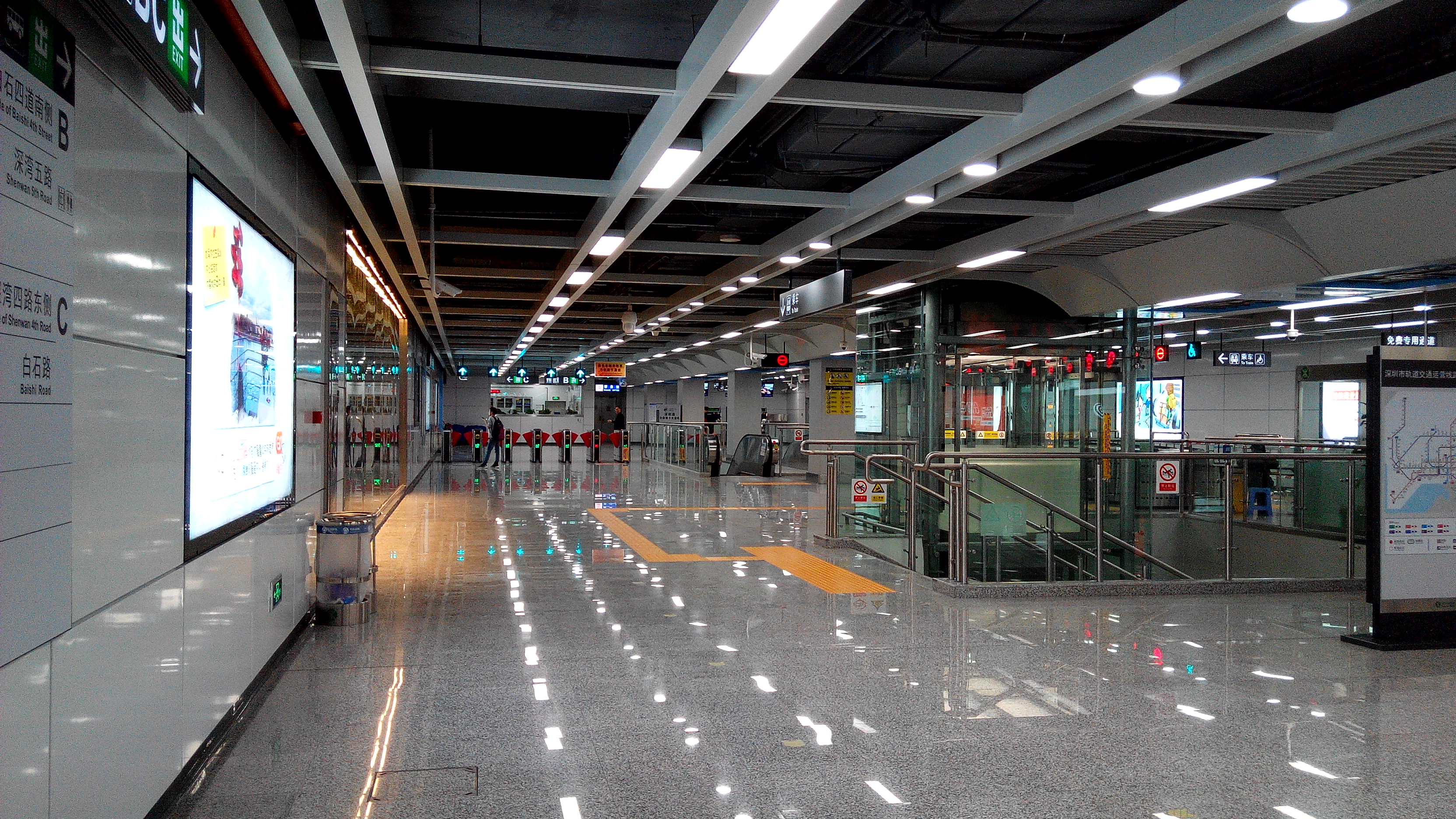 深圳地铁9号线 深湾站站厅